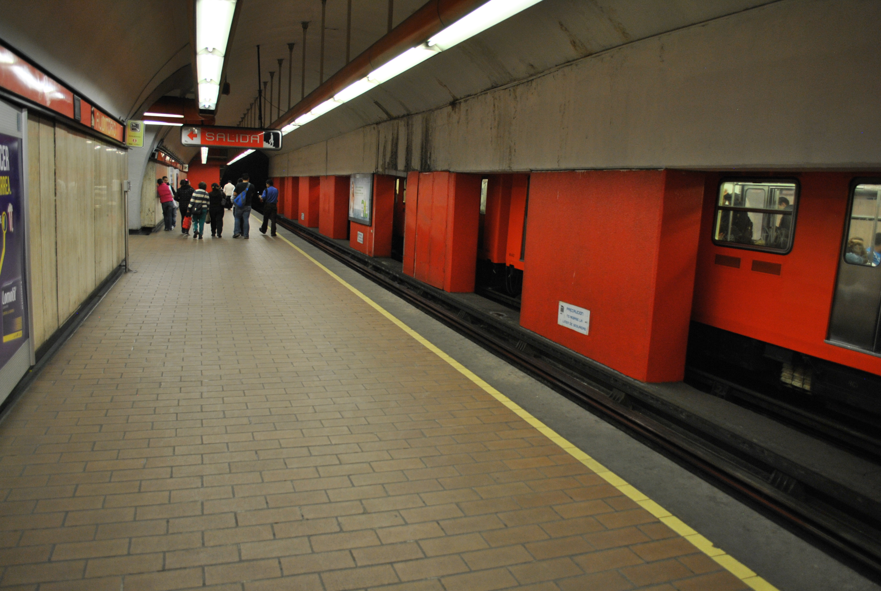 Estación Auditorio del Metro de la Ciudad de México.